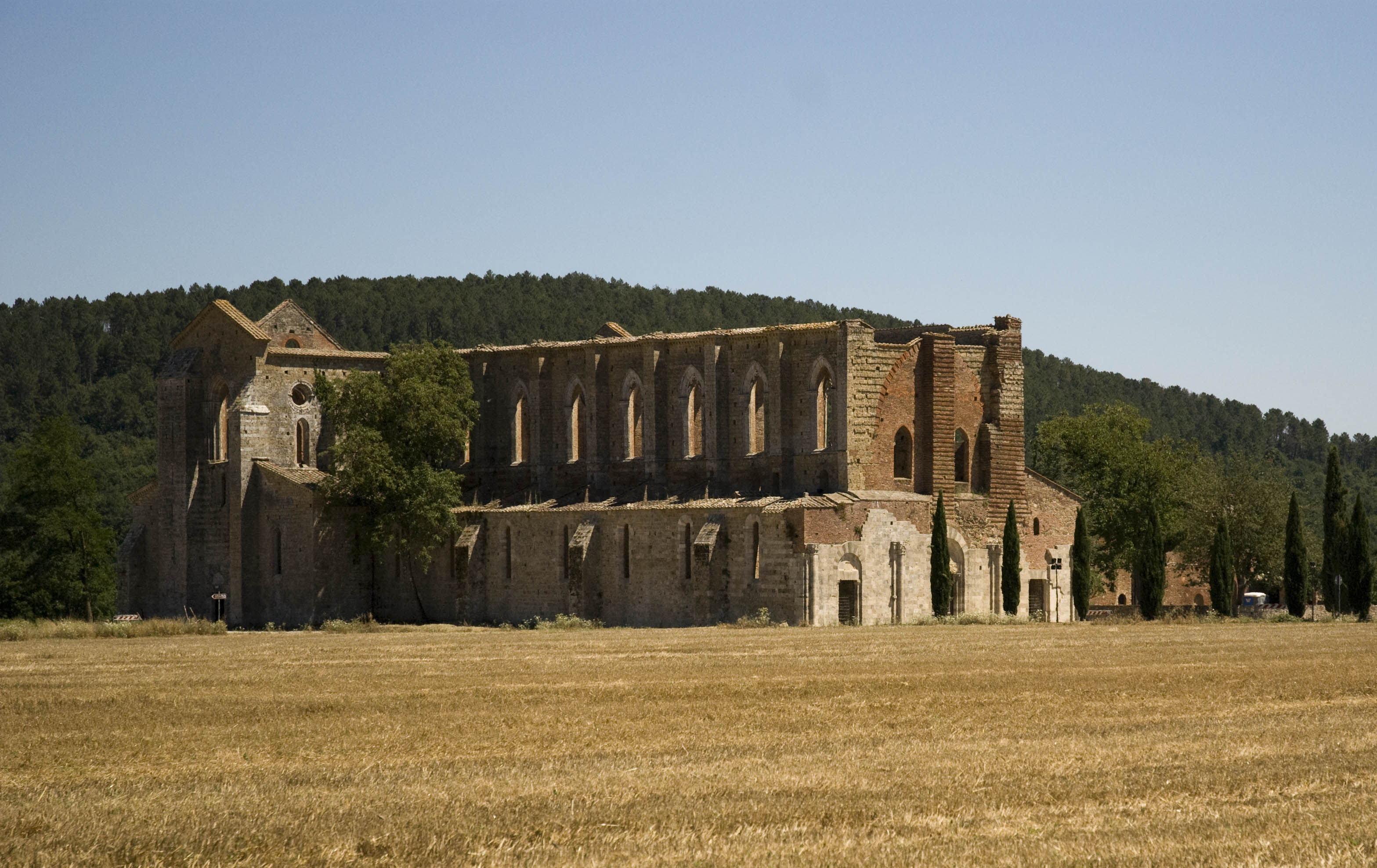 panorama dell'abbazia di san galgano (Chiusdino)